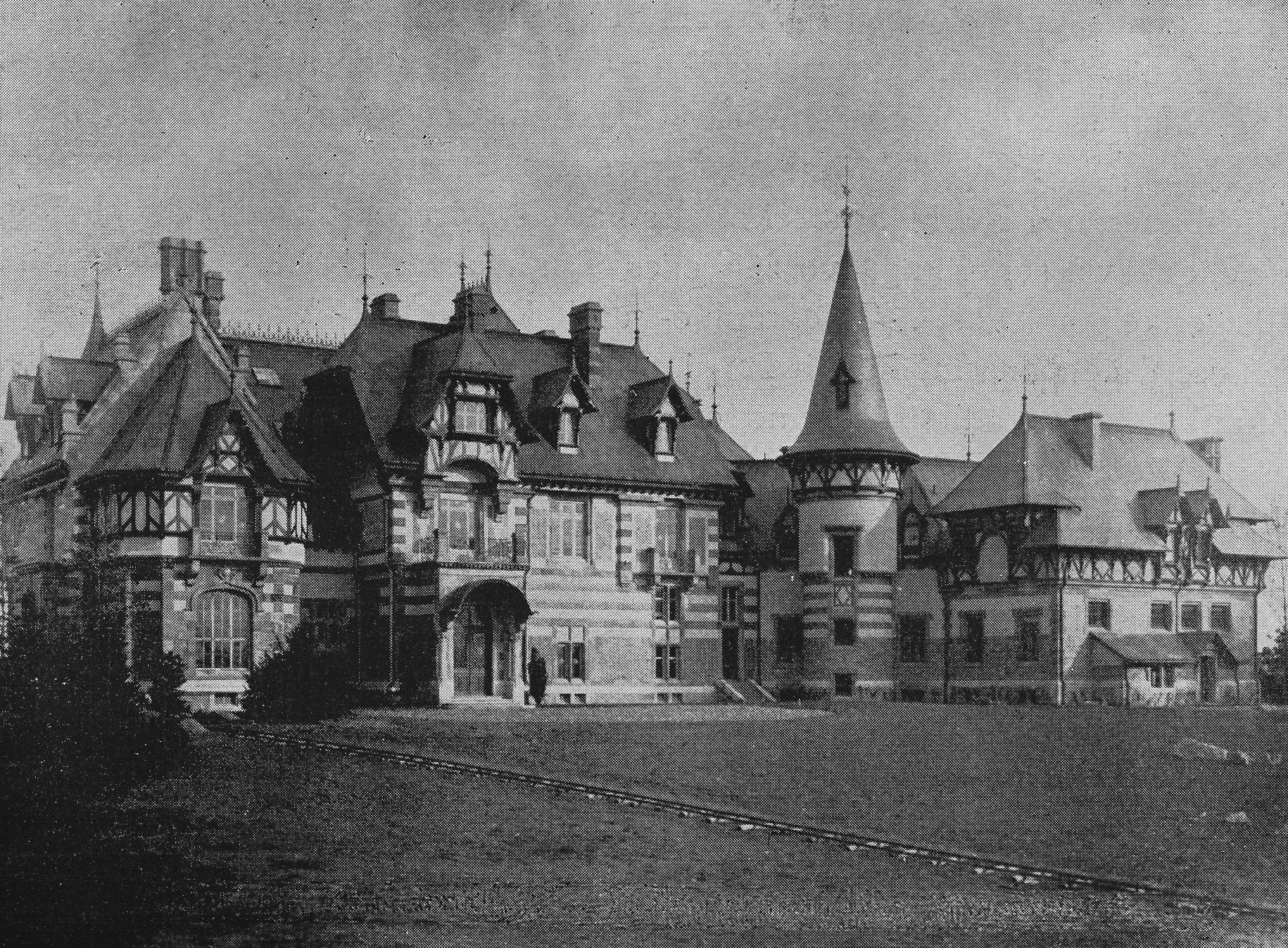 Bildunterschrift: Villa von Rothschild